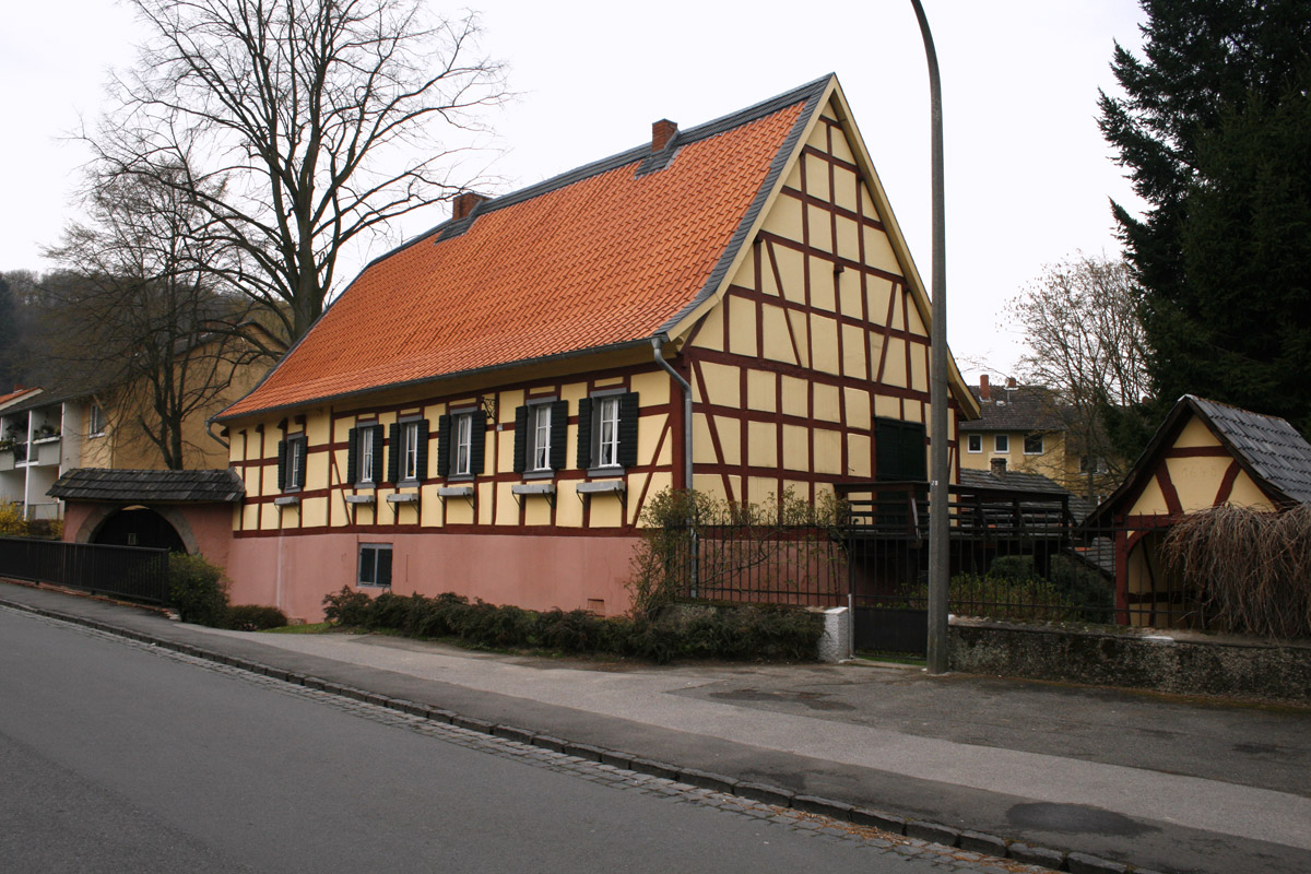 Der Klufterhof – Bauernhof in Bonn-Friesdorf, urkundlich erstmals 947 erwähnt.